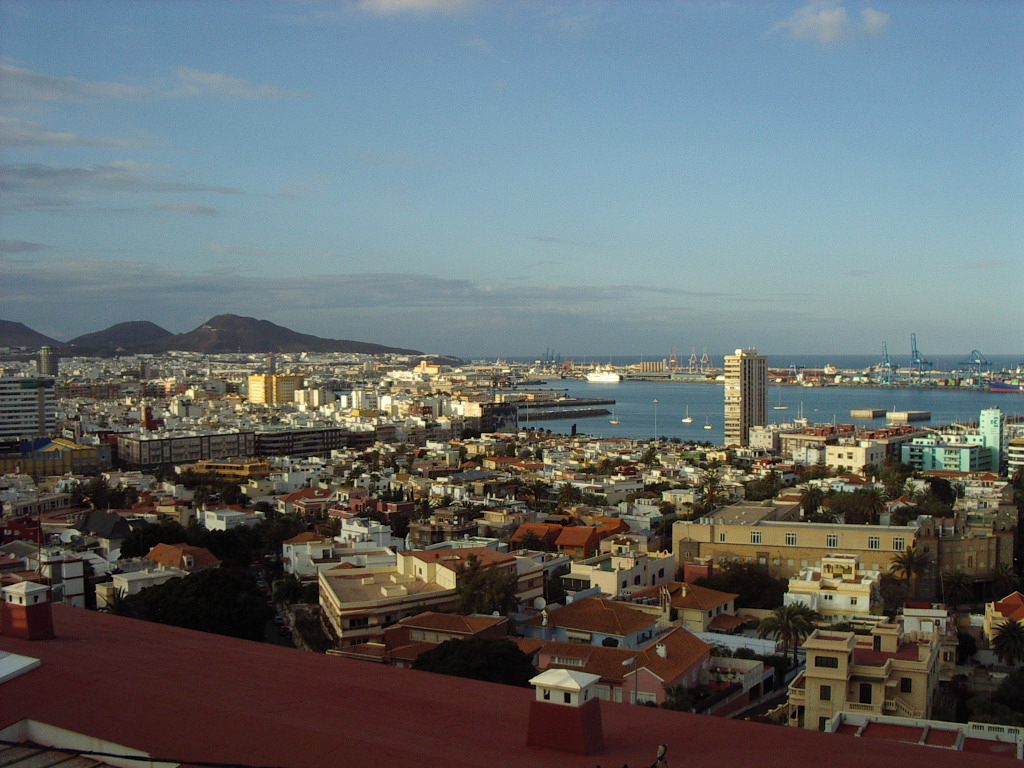 Vista de Ciudad Jardín y el Puerto de La Luz y Las Palmas, desde La Cornisa, en Las Palmas de Gran Canaria